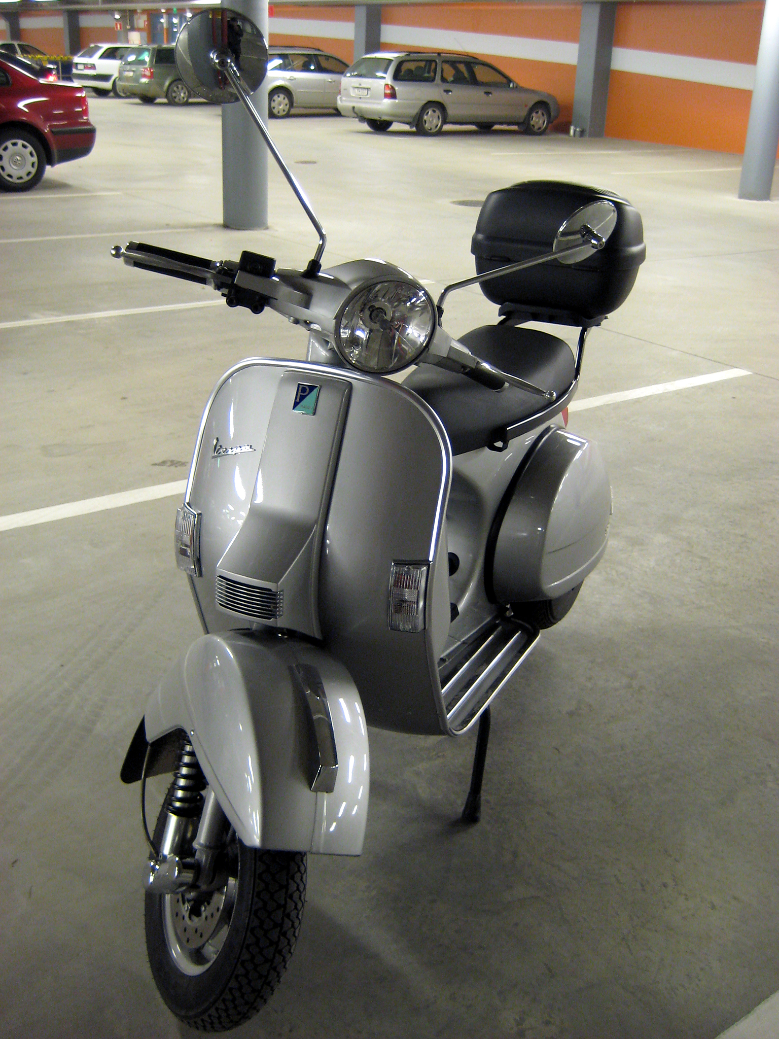 Piaggio's last classic motor scooter Vespa PX 200 (2003).